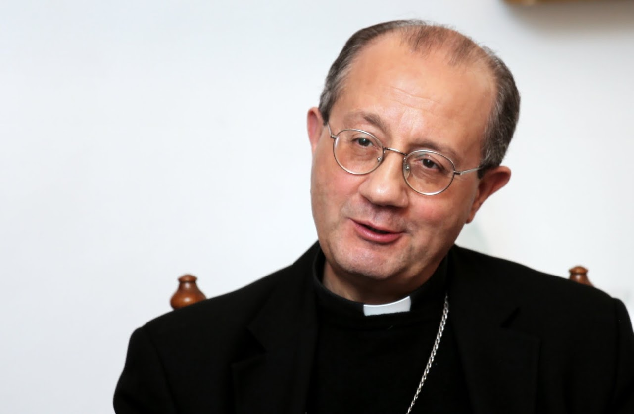 Bruno Forte érsek, Chieti-Vasto főpásztora